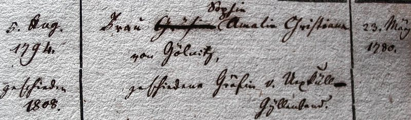 Ausschnitt aus dem evangelischen Familienregister Rottenburg am Neckar (heute im Stadtarchiv): Amalie von Göllnitz wurde im Alter von 14 Jahren mit Ludwig Karl Johann Otto, Graf von Uxkull-Gyllenband (* 15. Februar 1760) verheiratet. Der zuständige Pfarrer Weigelin aus Remmingsheim verschrieb sich bei der Eintragung mit „Frau Gräfin“ statt „Frau Vogtin“, vermutlich weil sie in Rottenburg als Frau Gräfin angesprochen wurde.